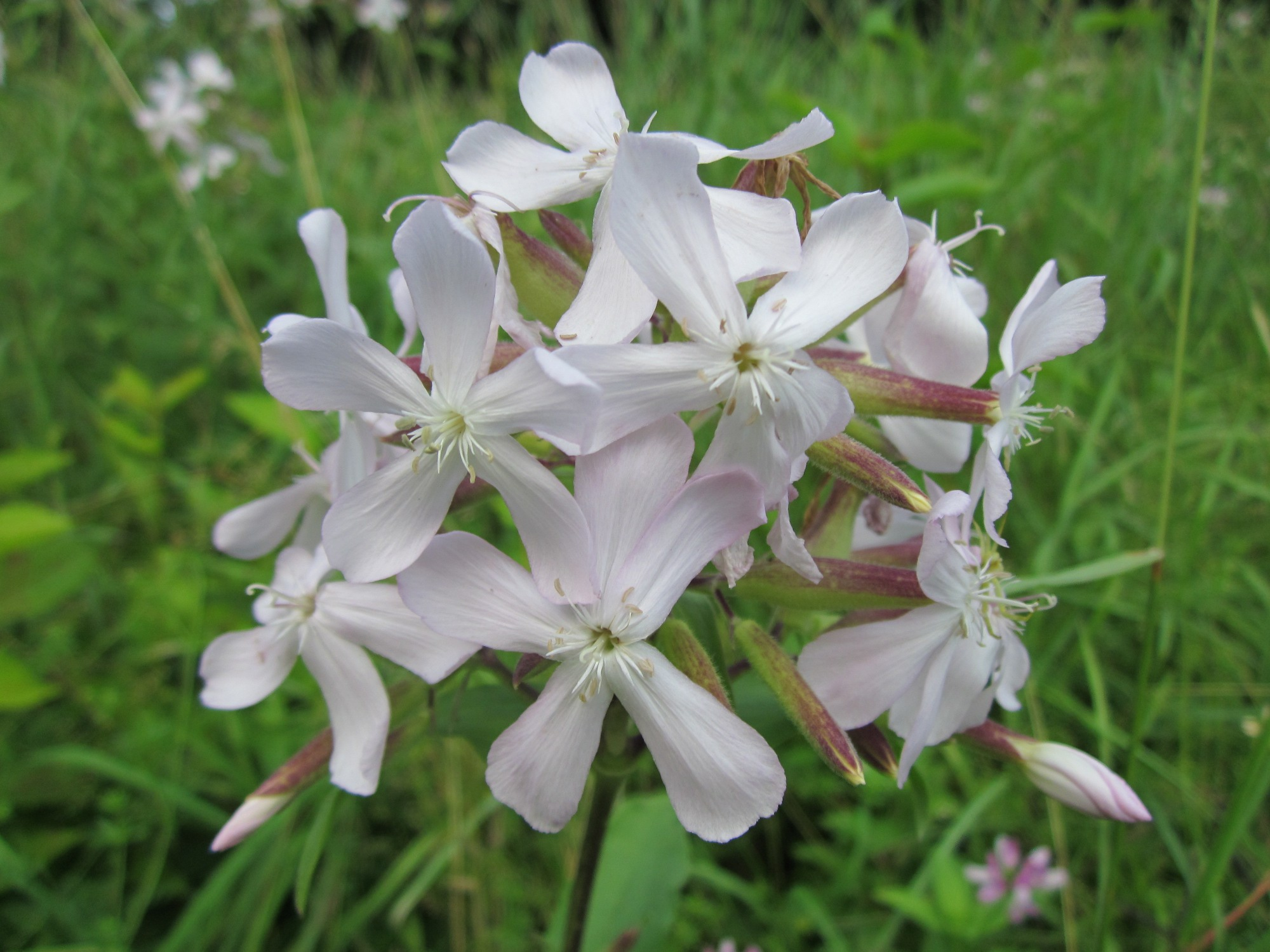 Gewöhnliches Seifenkraut (Saponaria officinalis) im Hockenheimer Rheinbogen